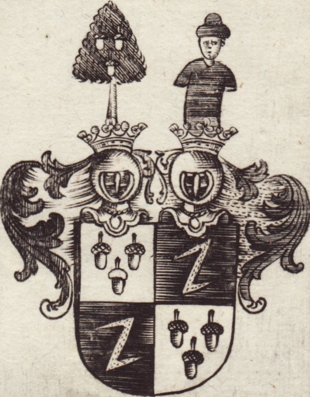 Wappen der Freiherren von Schwachheim (1775)